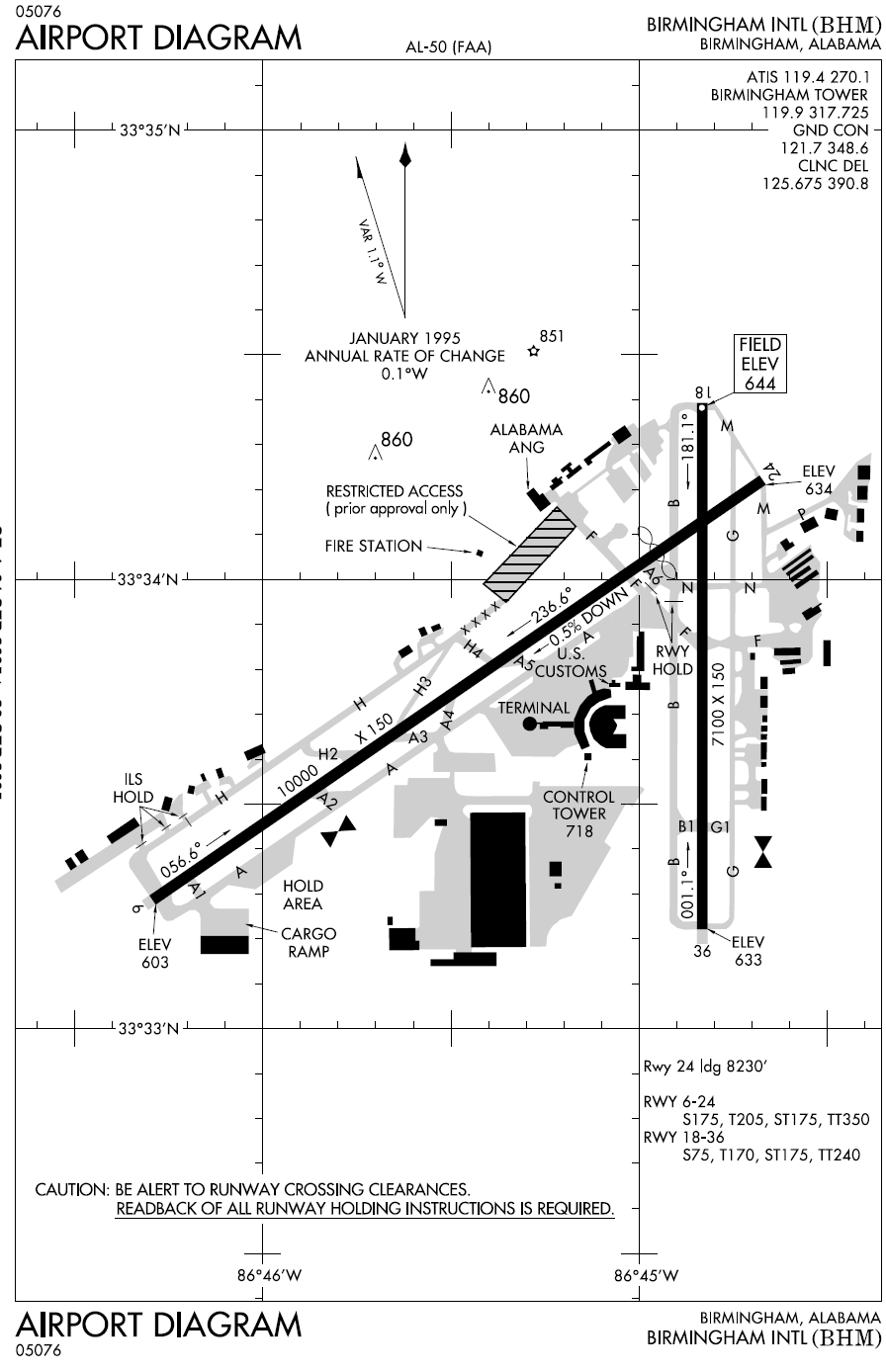 Diagrama del aeropuerto de Birminghan, Alabama